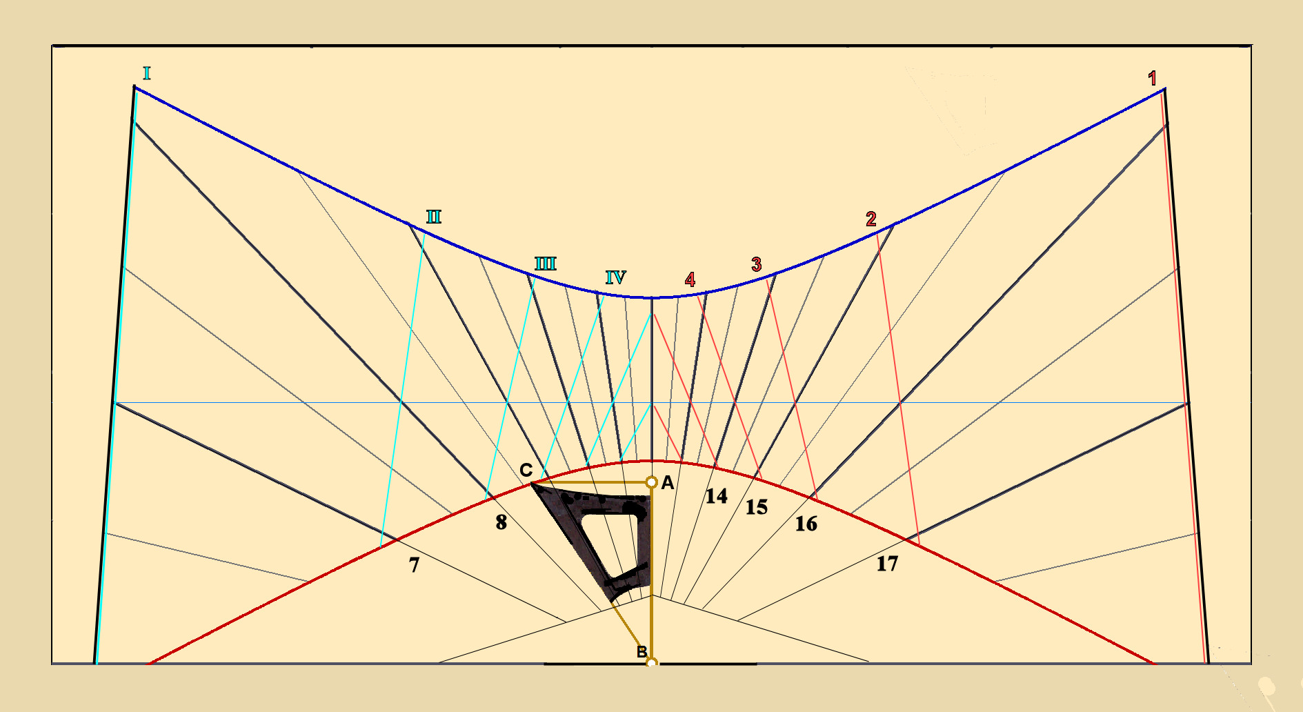 Dessin sélectif du cadran solaire de la mosquée Umayyade à Damas. Ne sont représentées que les lignes principales concernant les heures égales. Tracés gnomoniques : Logiciel Shadows, Page Wiki en ligne.